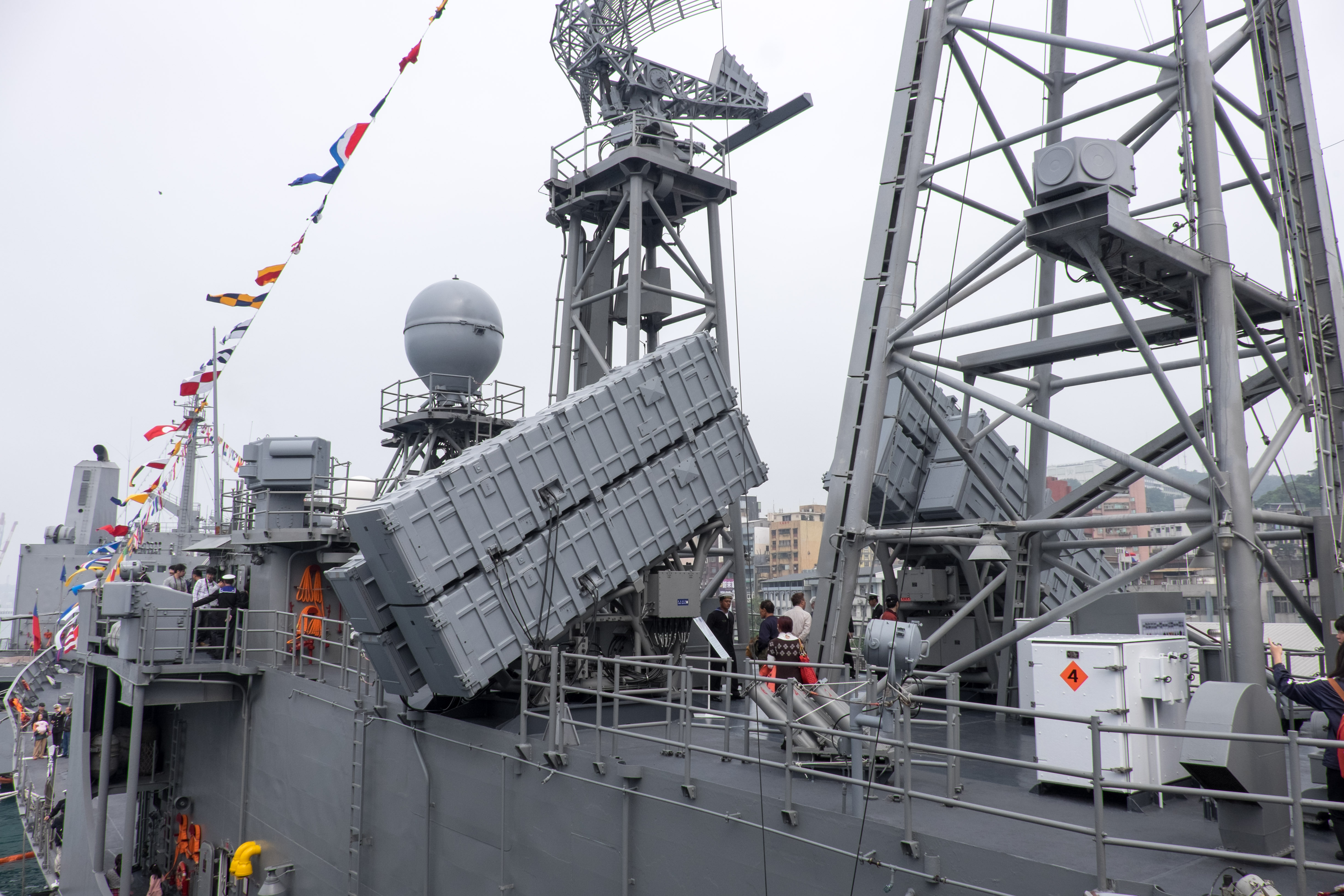 飛彈巡防艦班超（PFG2-1108）上甲板中部的雄風二型與雄風三型反艦飛彈發射器。